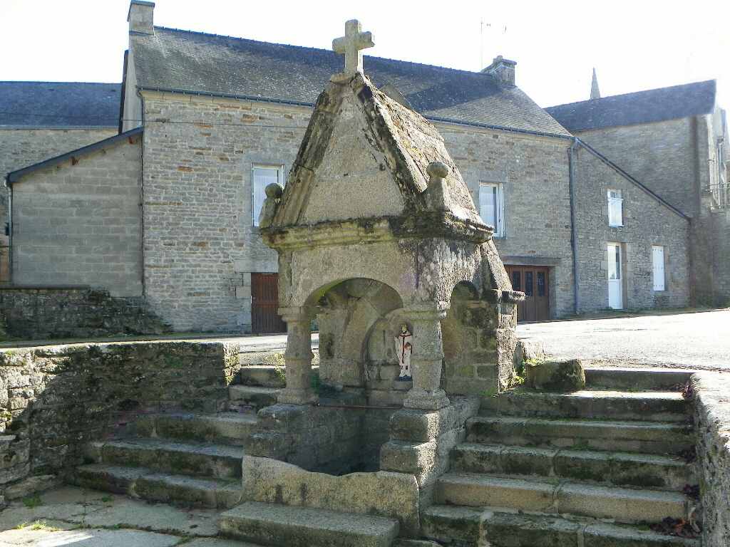 Fontaine St Brieuc à Cruguel département du Morbihan